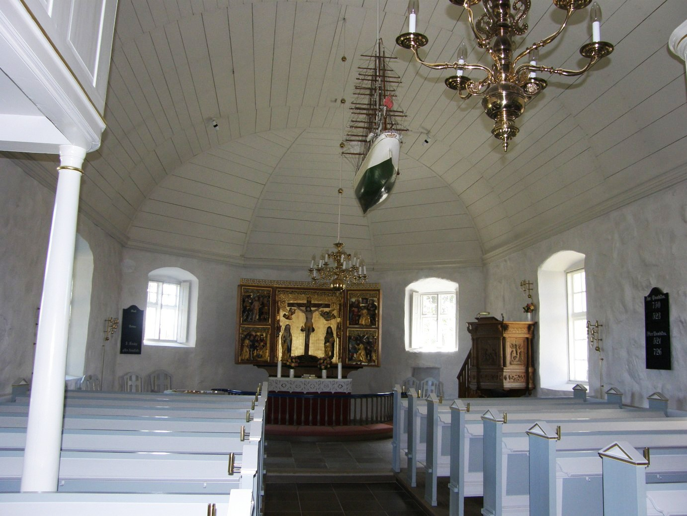 ołtarz